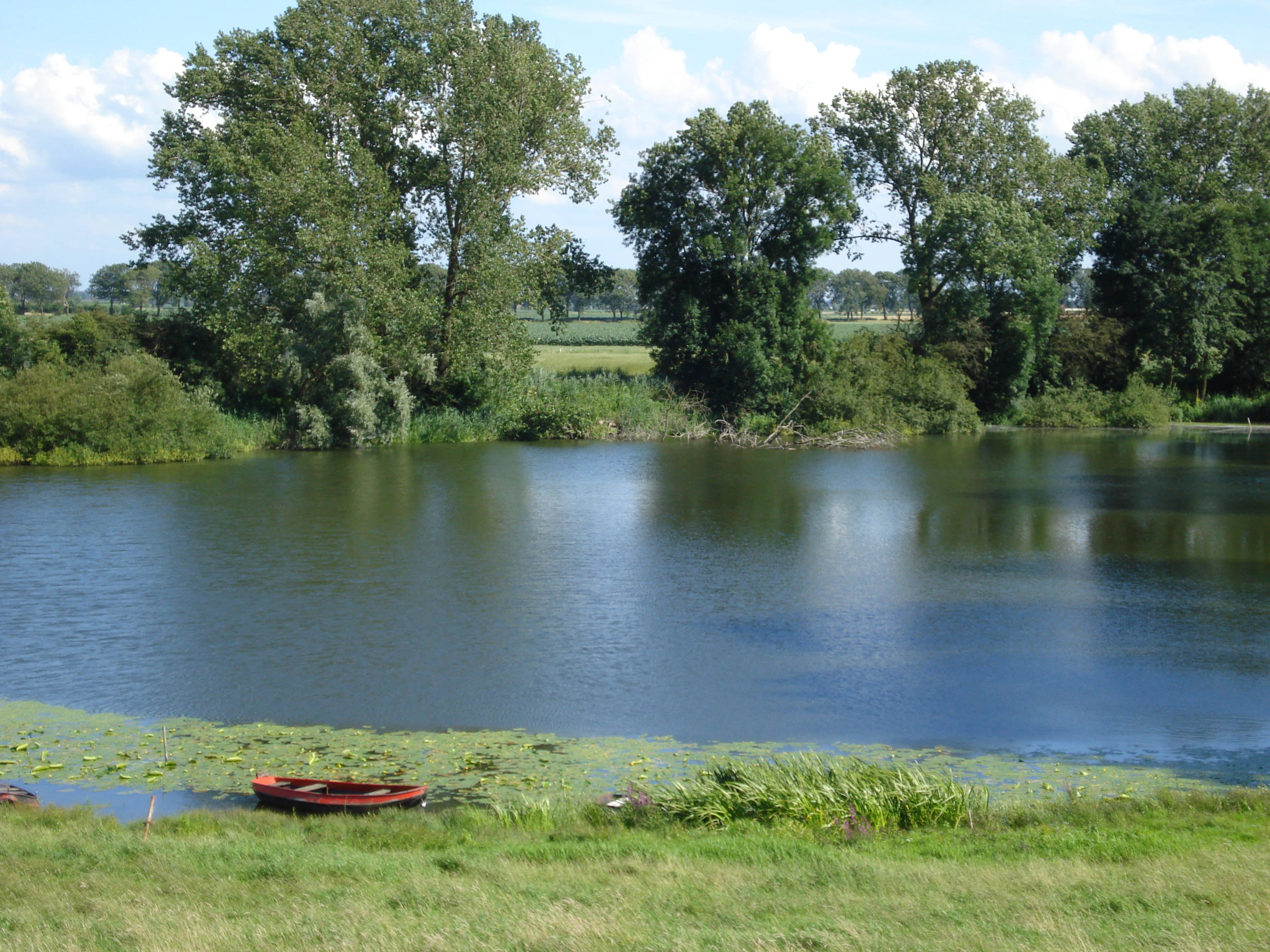 Kessel (North Brabant), Soldatenwiel, a kolk lake aside the Meuse river.